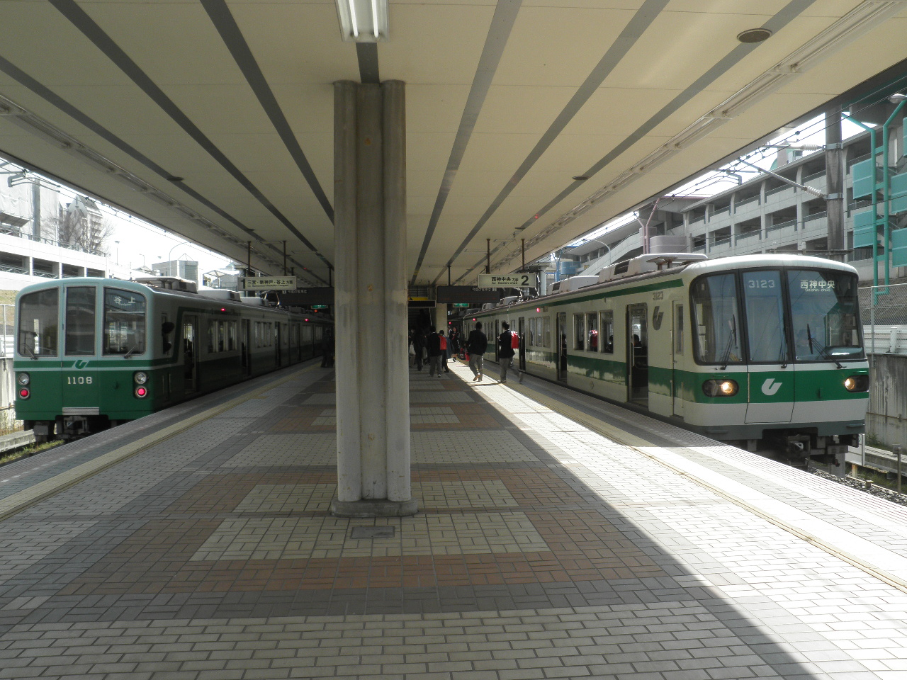 西神南駅のホーム